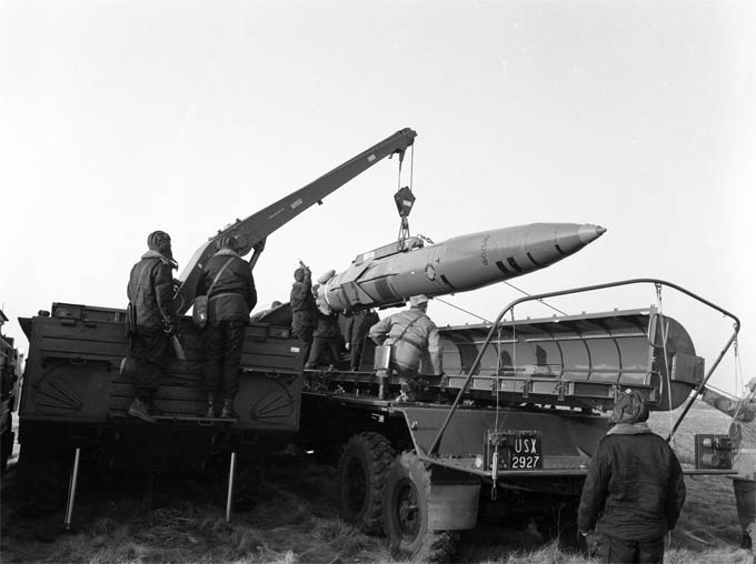 Pierwszy start Toczki w WP